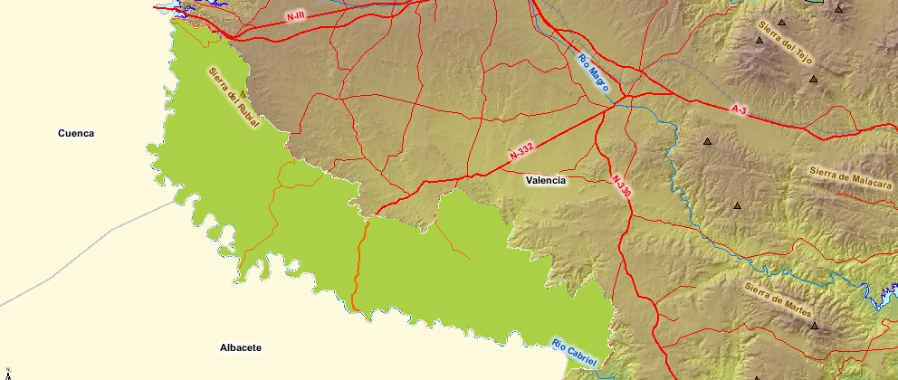 Mapa del parque natural de las Hoces del Río Cabriel